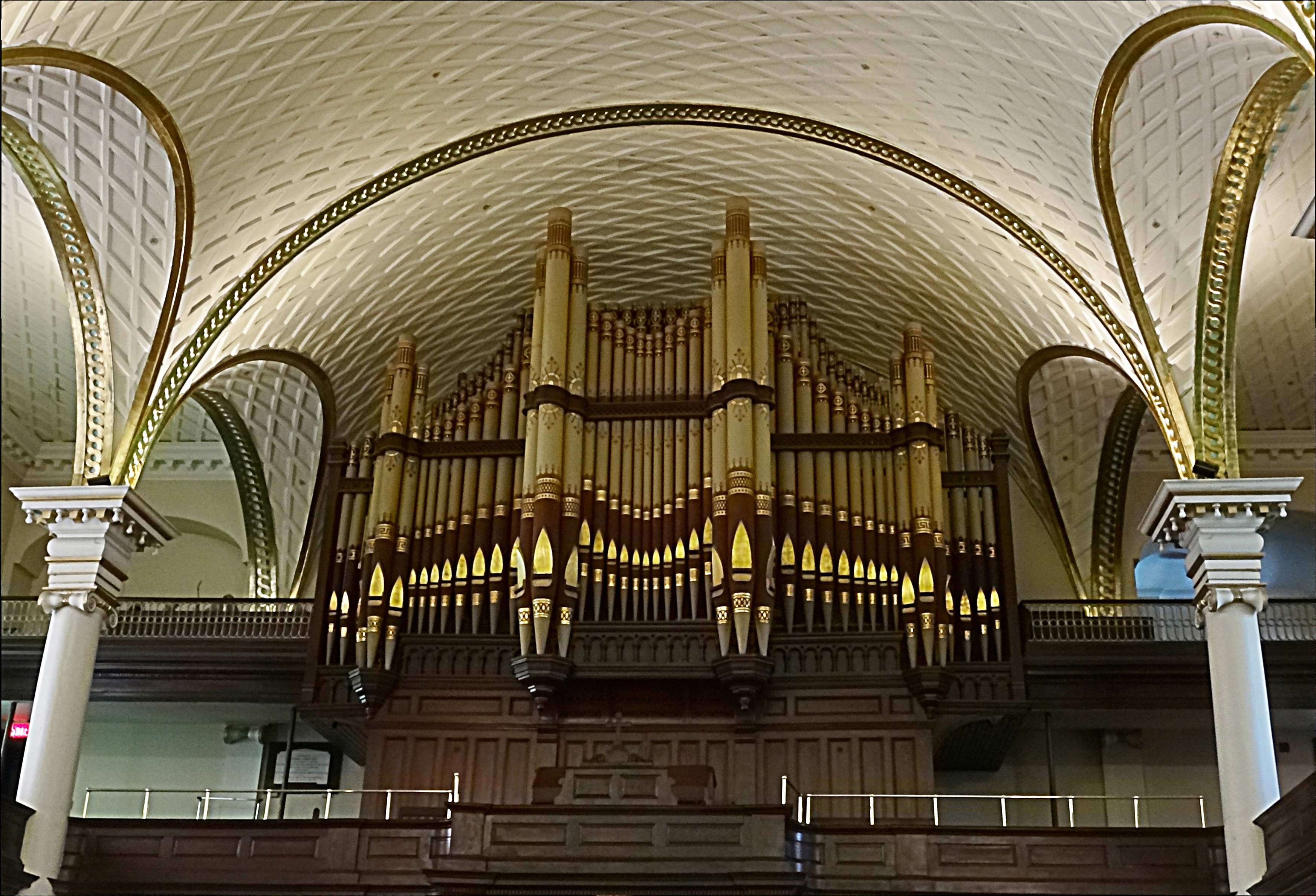 Orgel von Casavant Frères (1909)